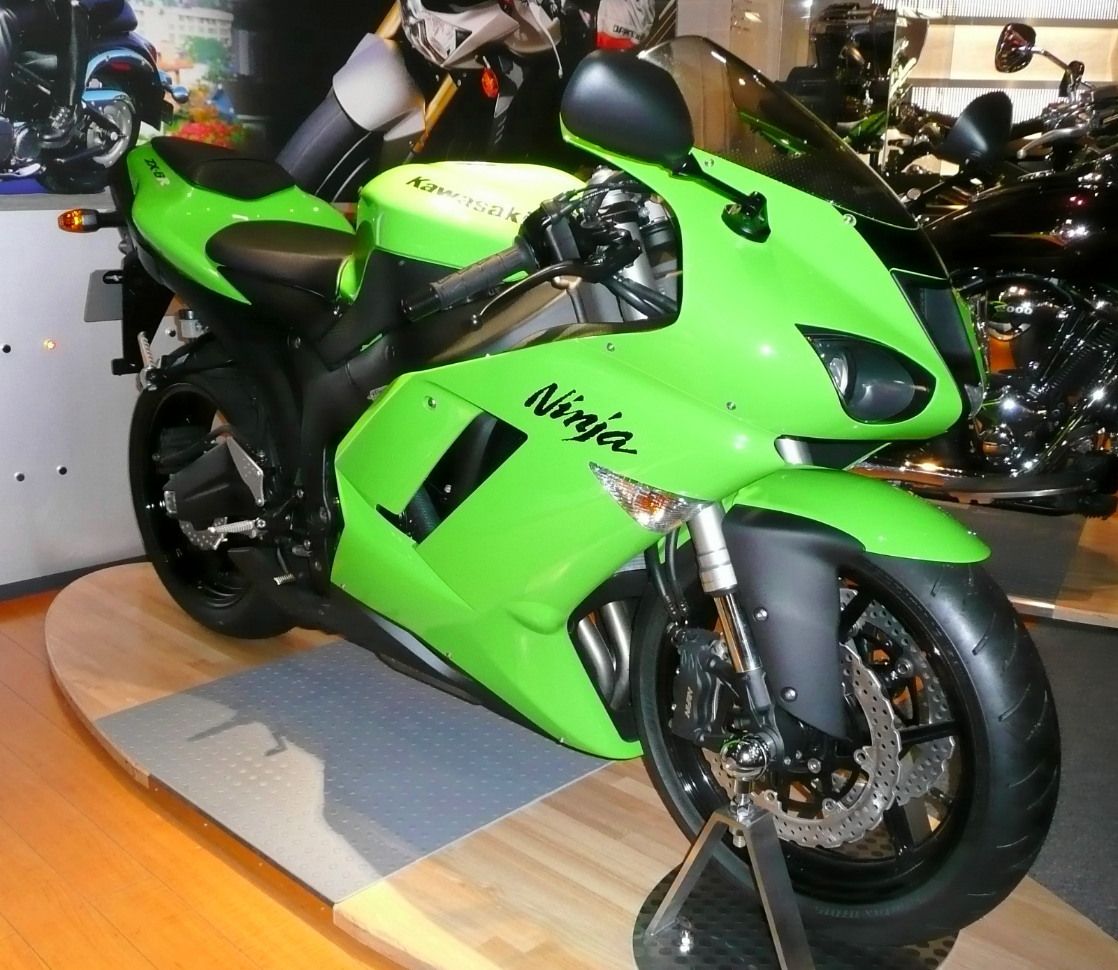 Kawasaki Ninja ZX-6R 2007,lime green. カワサキ・ニンジャZX-6R 2007年式（ライムグリーン）